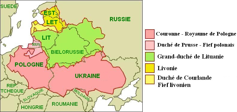 royaume polono-lituanien